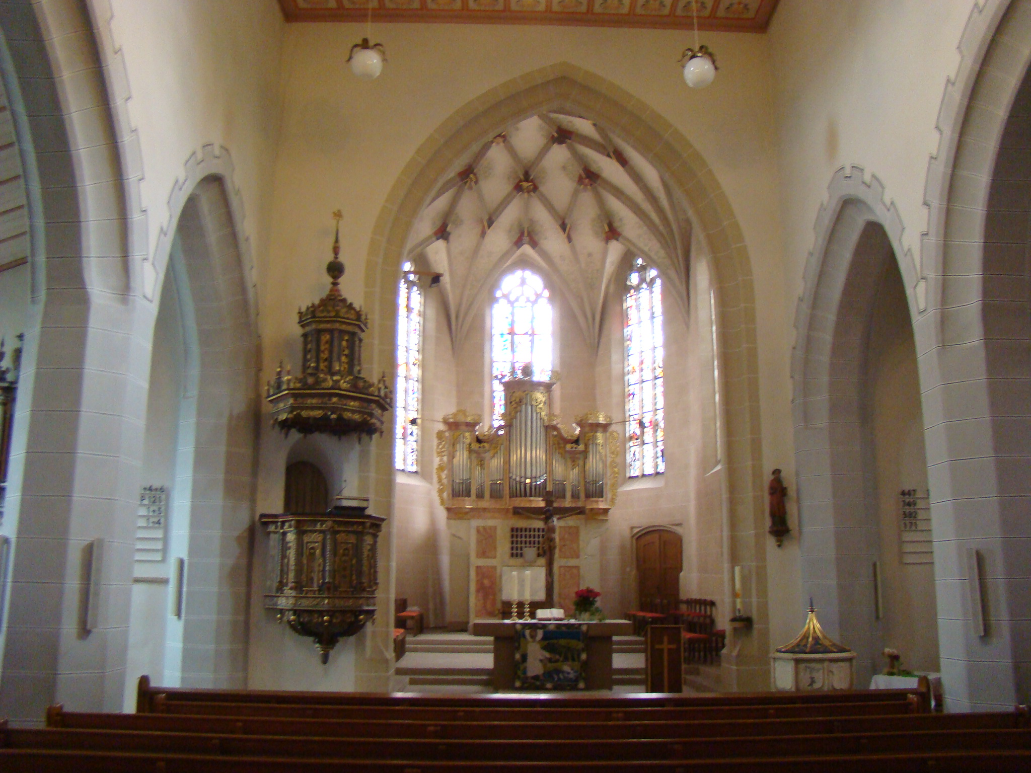 Münsingen